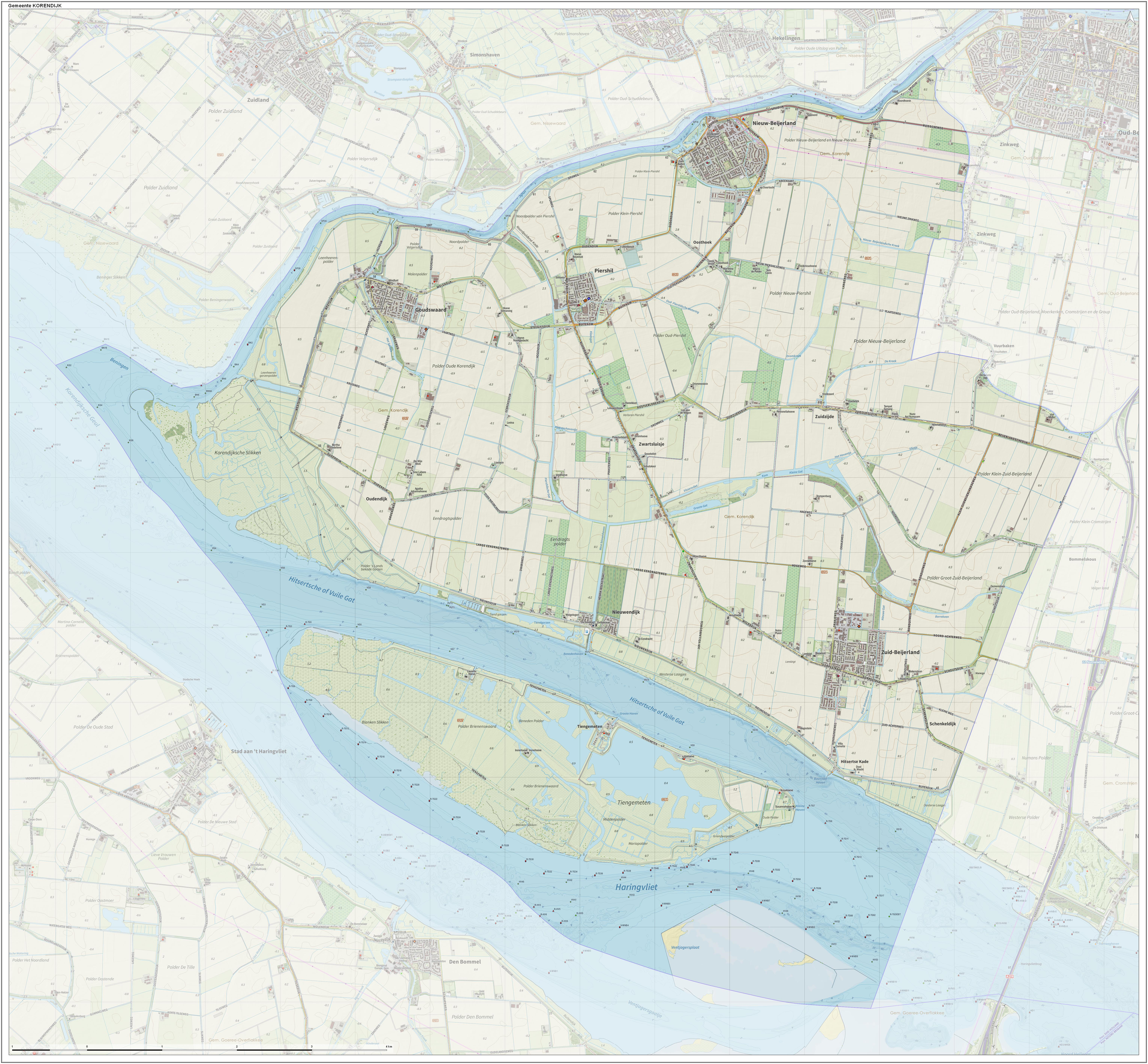 Topografische gemeentekaart. Resolutie: 400 pixels/km. Kaartbeeld samengesteld uit de open geodata van de Top10NL en Top25namen (Kadaster), Creative Commons-BY licentie. Gebouwvlakken uit open geodata BAG extract. Wegen uit de OpenStreetMap, OpenStreetMap community. Reliëfschaduw uit de Actuele Hoogtekaart AHN2. Samenstelling en kleurenschema: Jan-Willem van Aalst, met QGIS. Zie ook de Legenda.